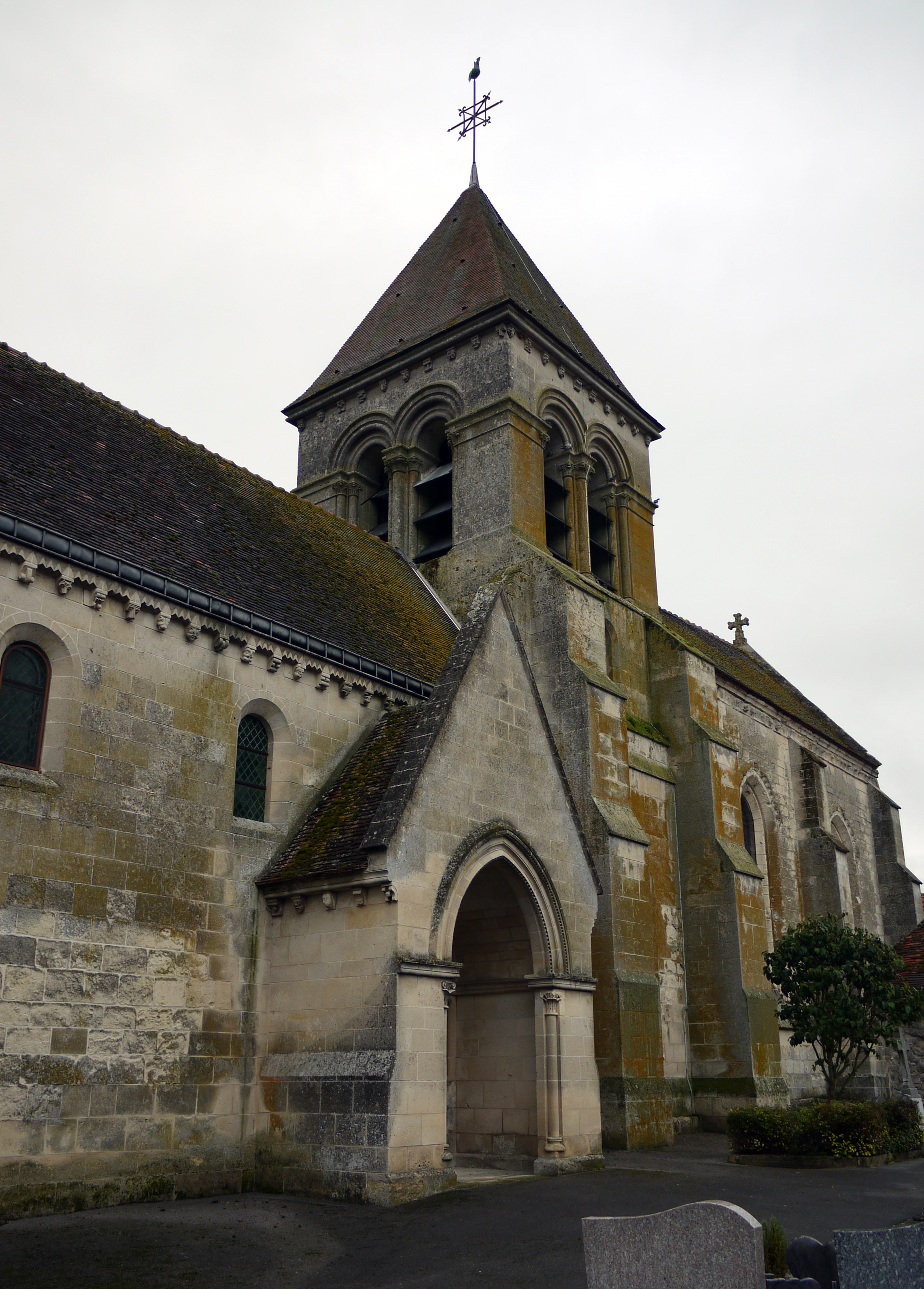 Église Saint-Pierre de Beugneux.